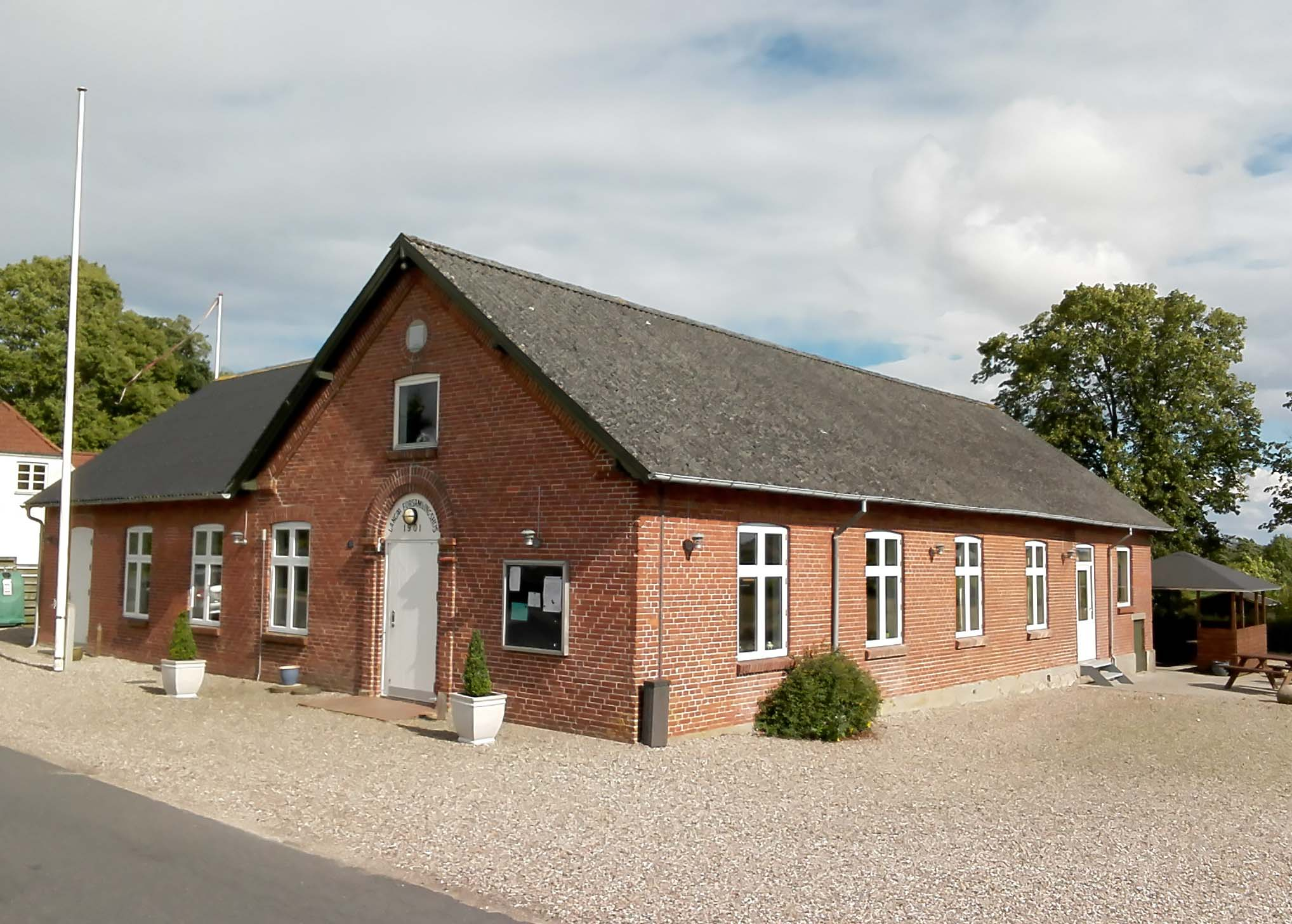 Forsamlingshuset i Langå (Nyborg Kommune)